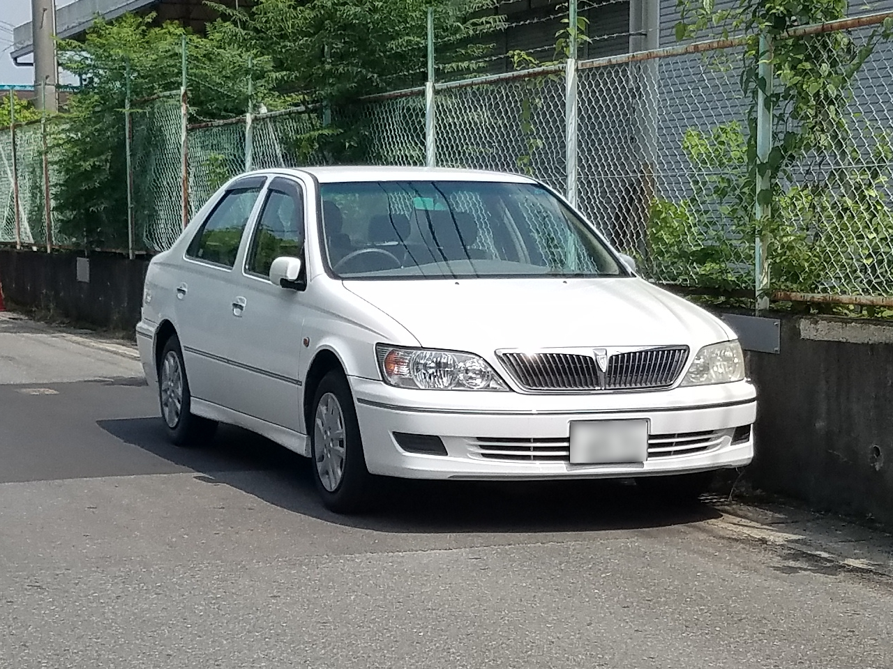 ビスタセダン N180L(後期型）